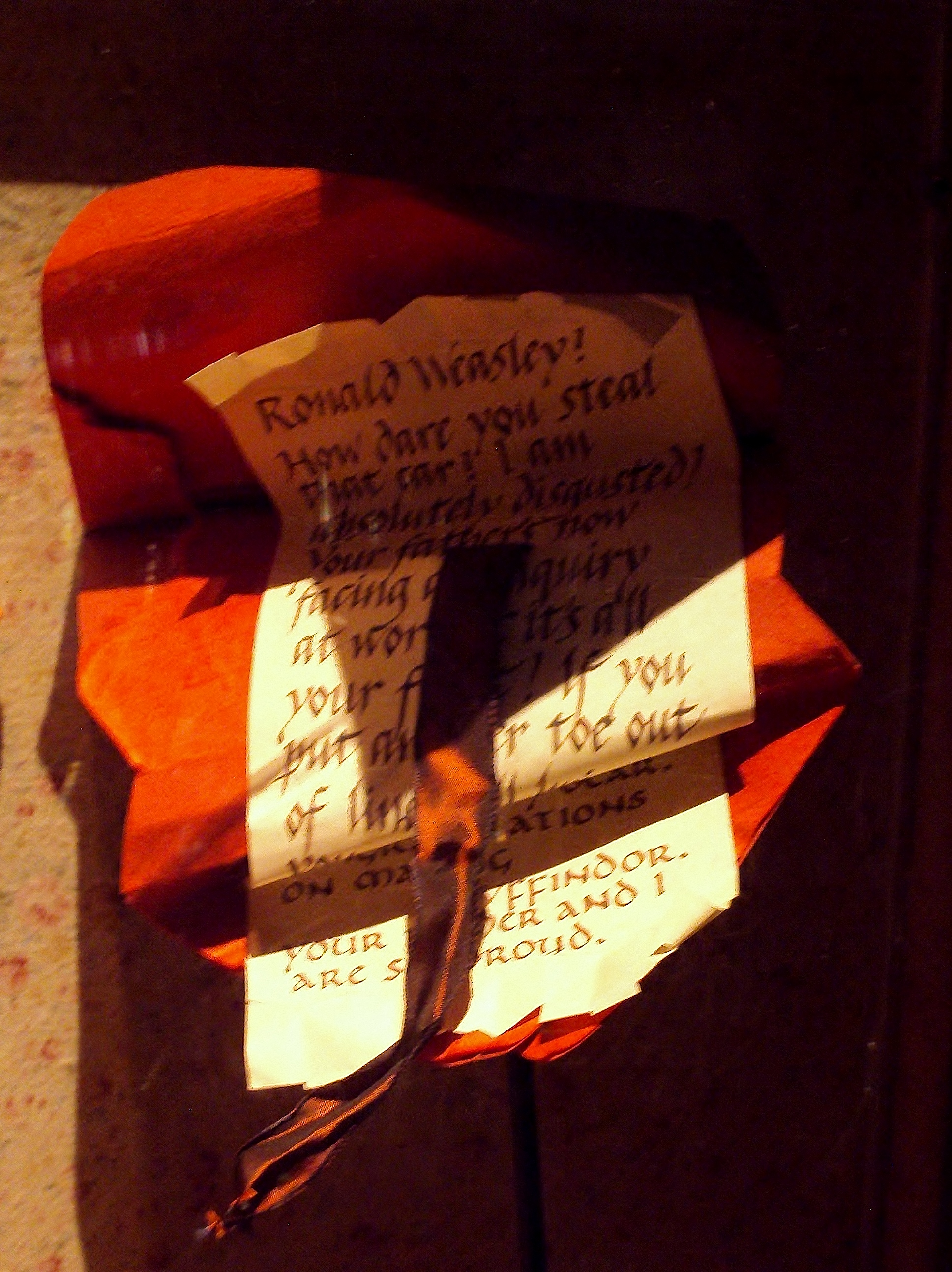 Brulbrief (Engels: Howler) tijdens Harry Potter: The Exhibition in Brussel (België)